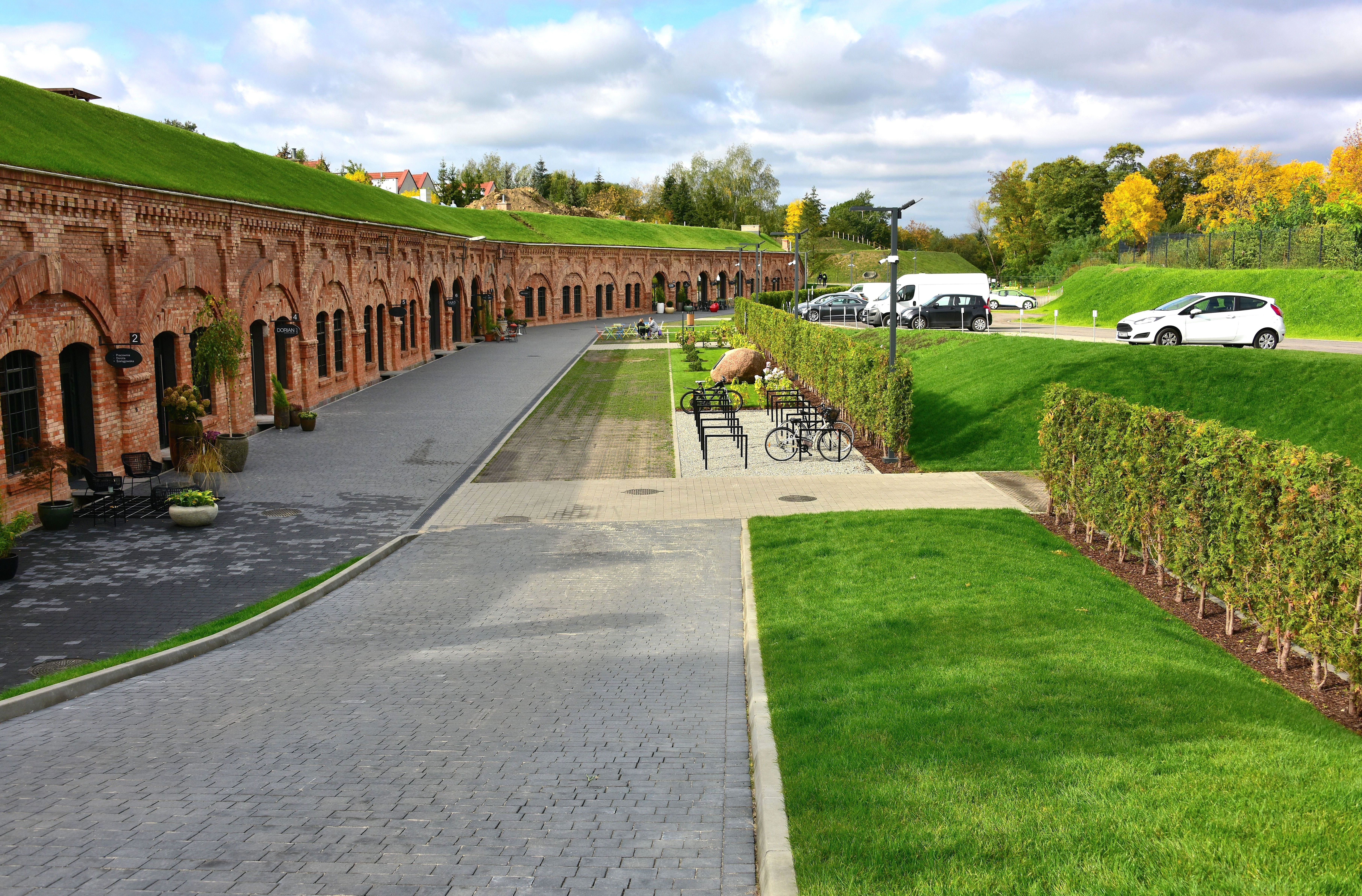 Fort Służew przy ul. Nowoursynowskiej w Warszawie